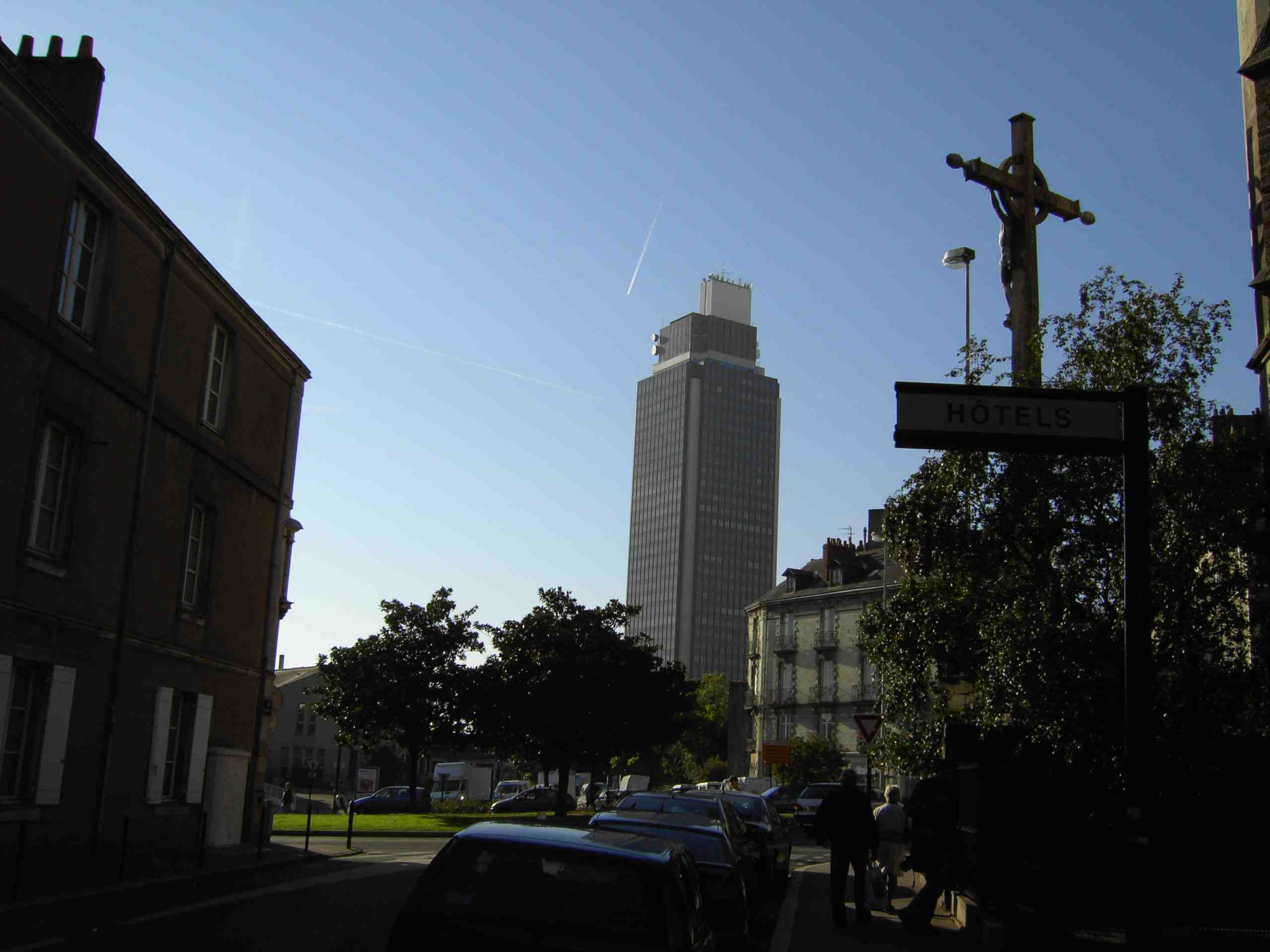 Nantes, Blick über die Stadt. Fotograf: Bernd Reichelt. Aufnahme: September 2005.